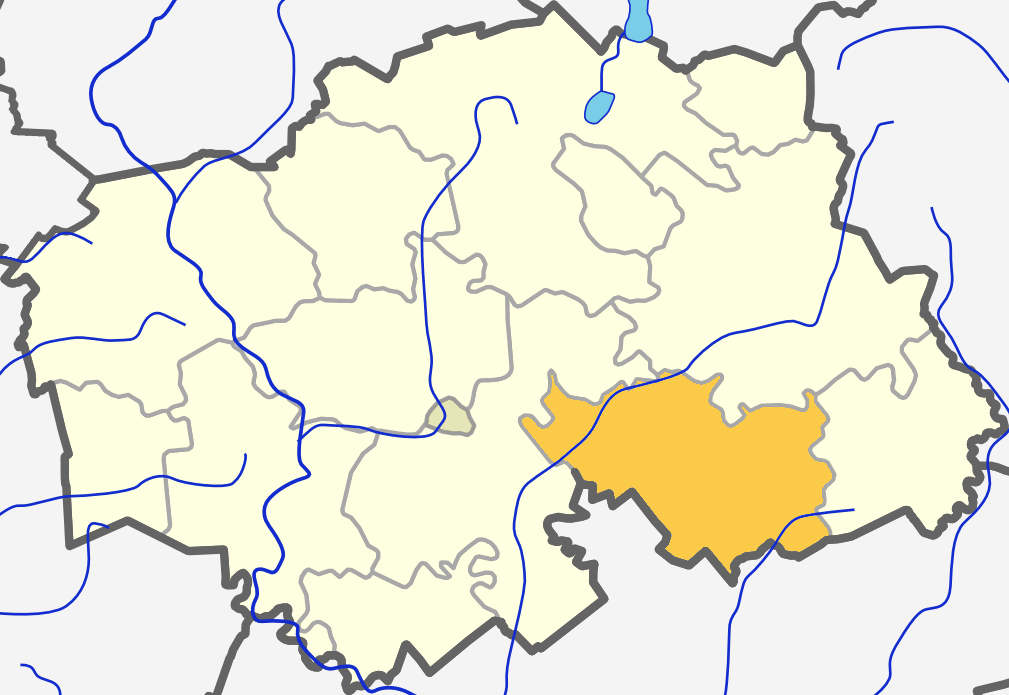 Расположение Упинского староства на карте Шилальского района